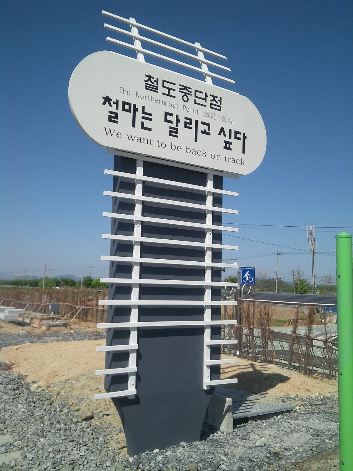 백마고지역으로 옮겨세워진 경원선 철도중단점 안내판